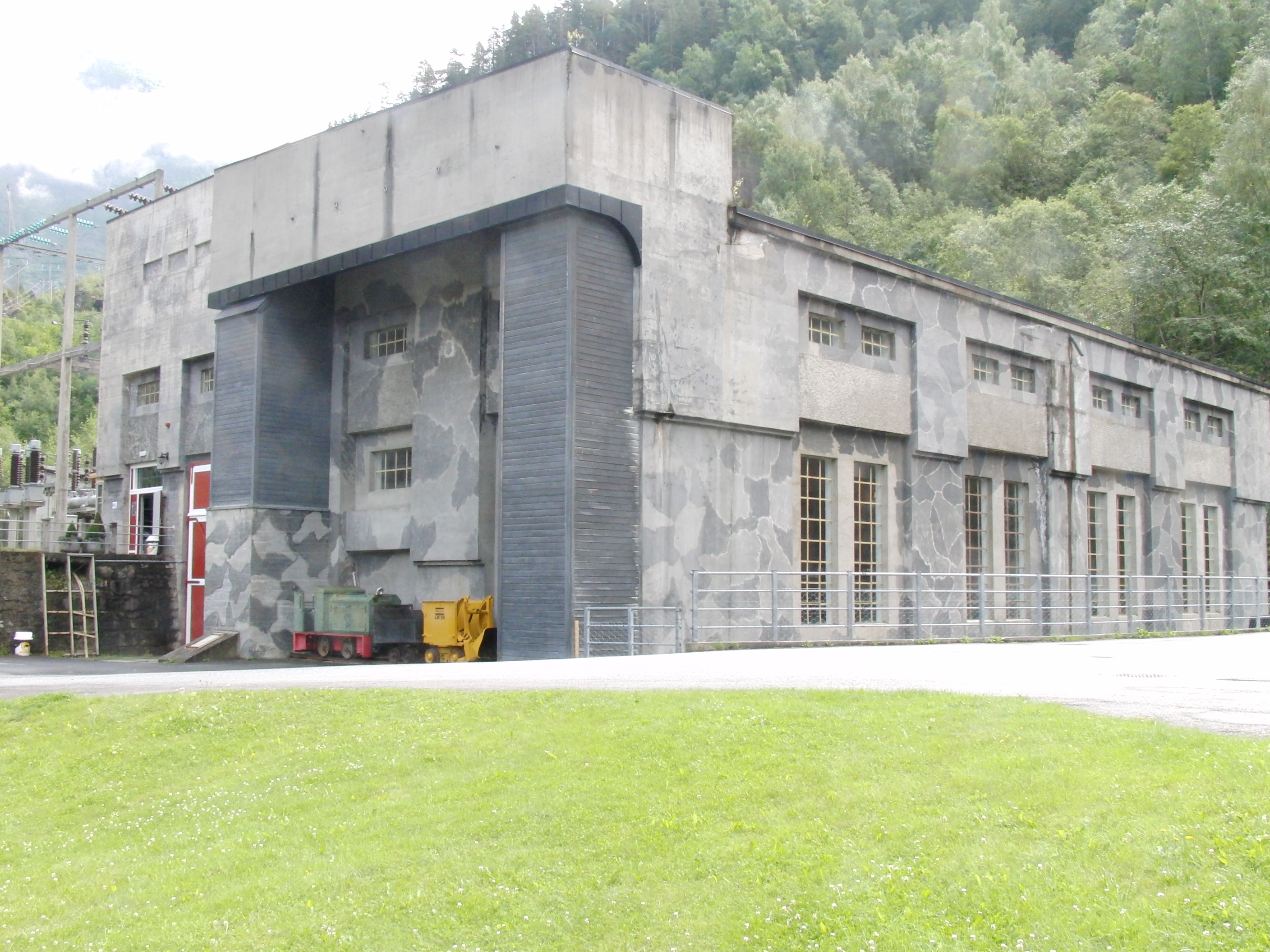 Tafjord 1 kraftverk (1923). Nedlagt, nå museum.